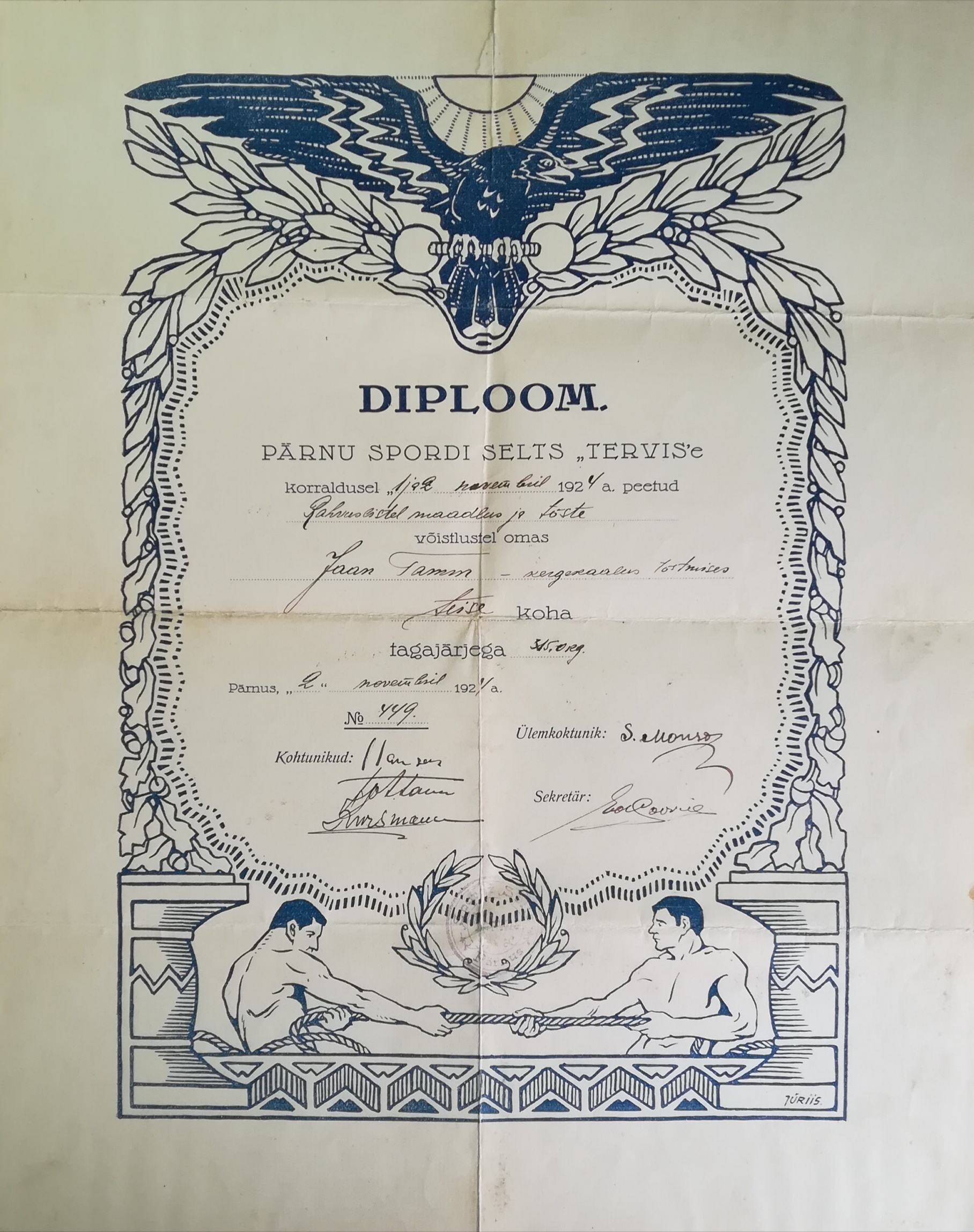 02.11.1924 Diplom